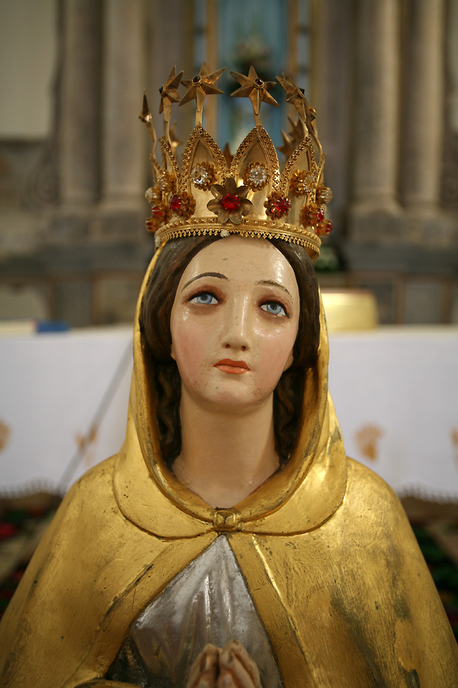 Gospa Vidoška.